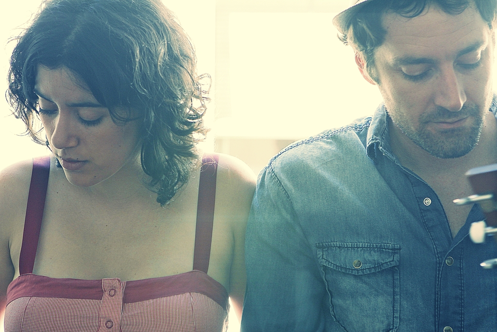 Medelia, por Mercedes Hausmann